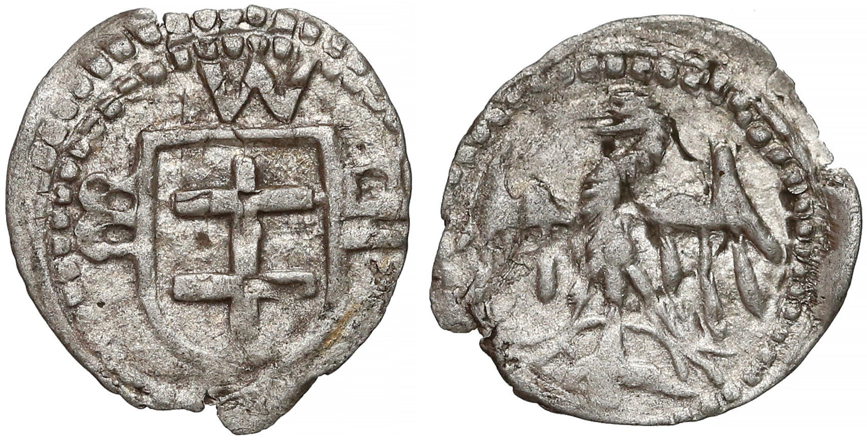 Denar koronny Władysław Jagiełło Wschowa